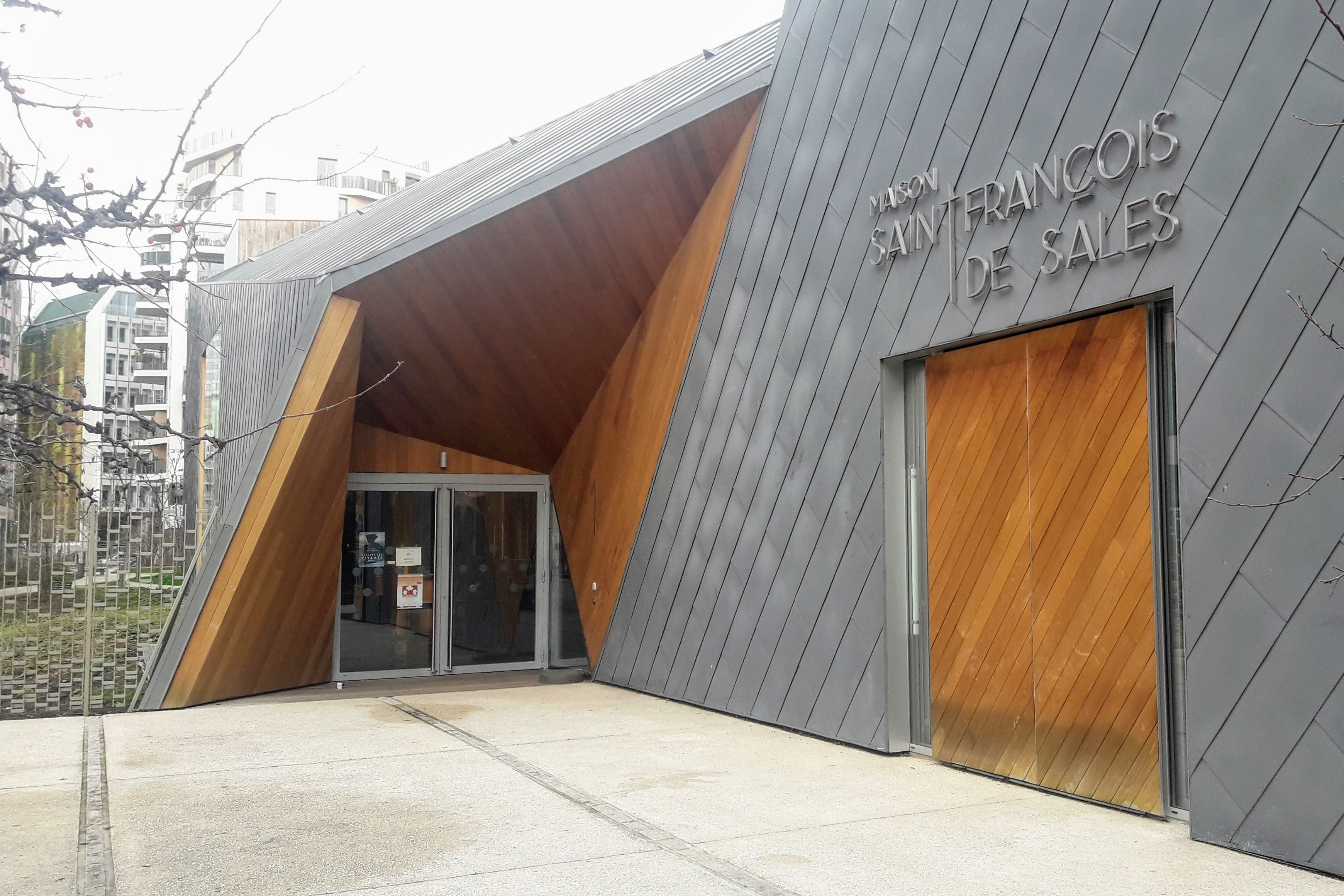 Maison d'église Saint François de Sales de Boulogne-Billancourt (Hauts de Seine)